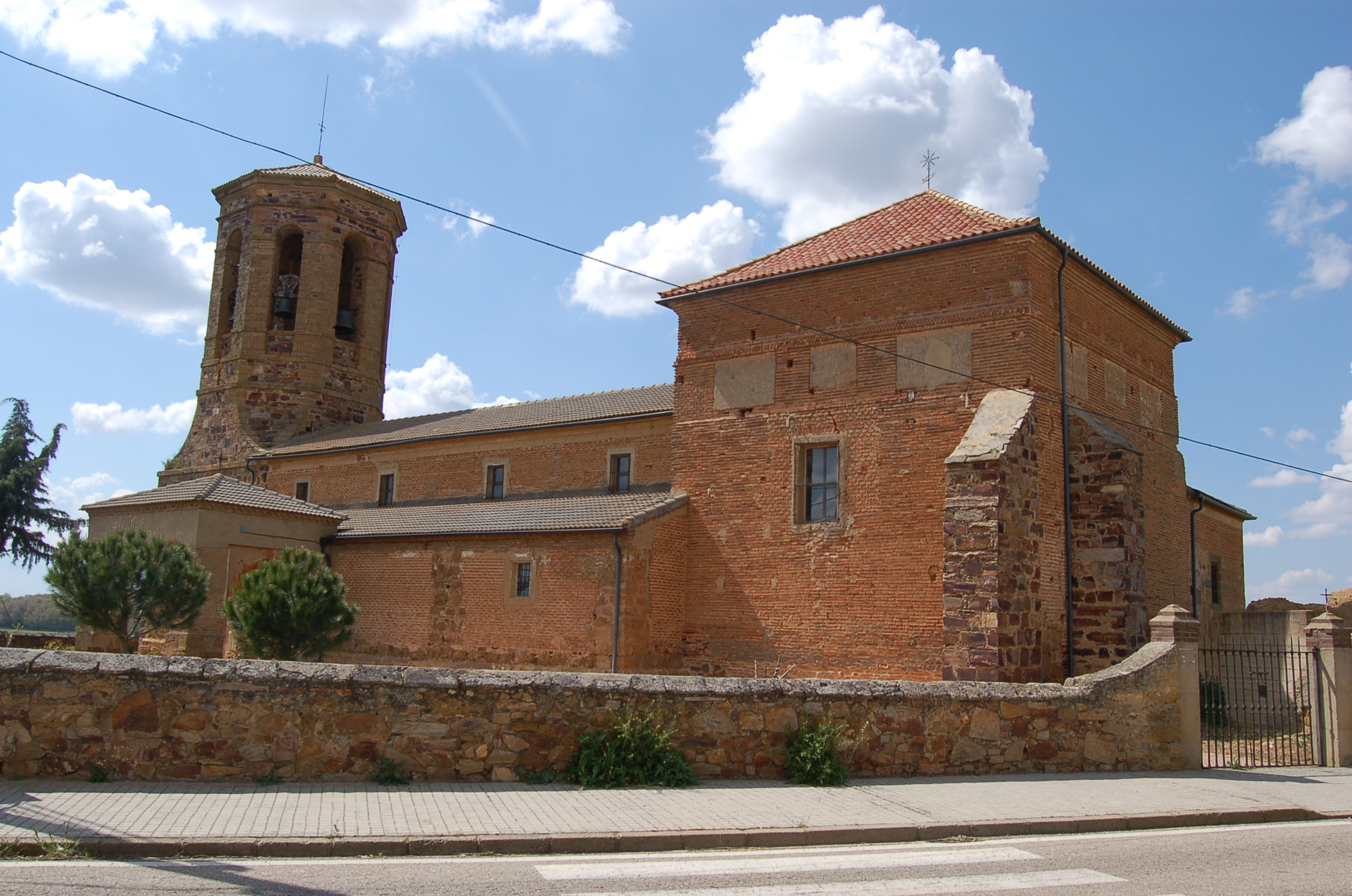 Igrexa parroquial de Barcial del Barco